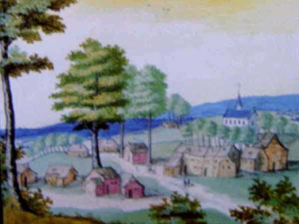 ville de Maubeuge vers 1600 telle que dessinée dans les album de Croy